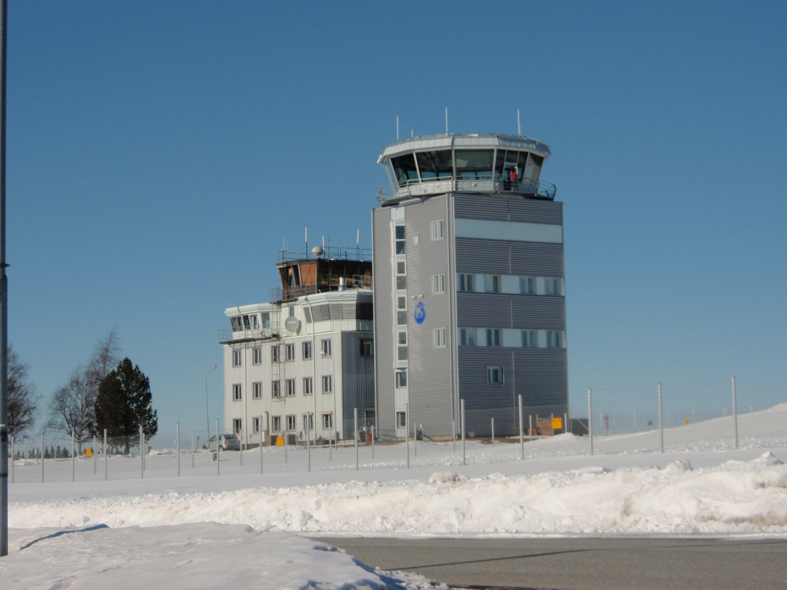 Kontrolltornet till Åre Östersund airport